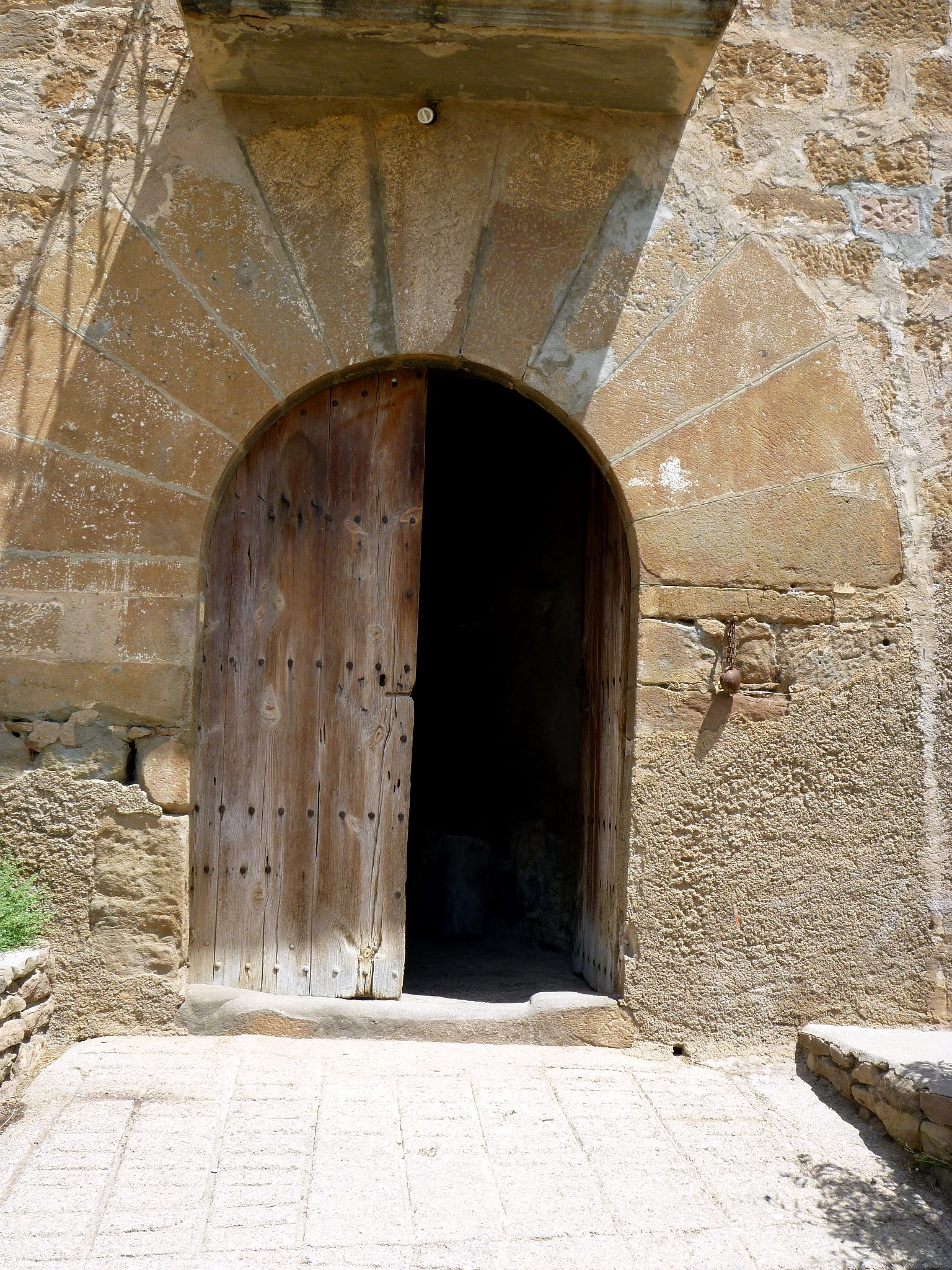 Masia l'Alguer (Olius), portal This is a a photo of a natural area in Catalonia, Spain, with id: ES510ORA